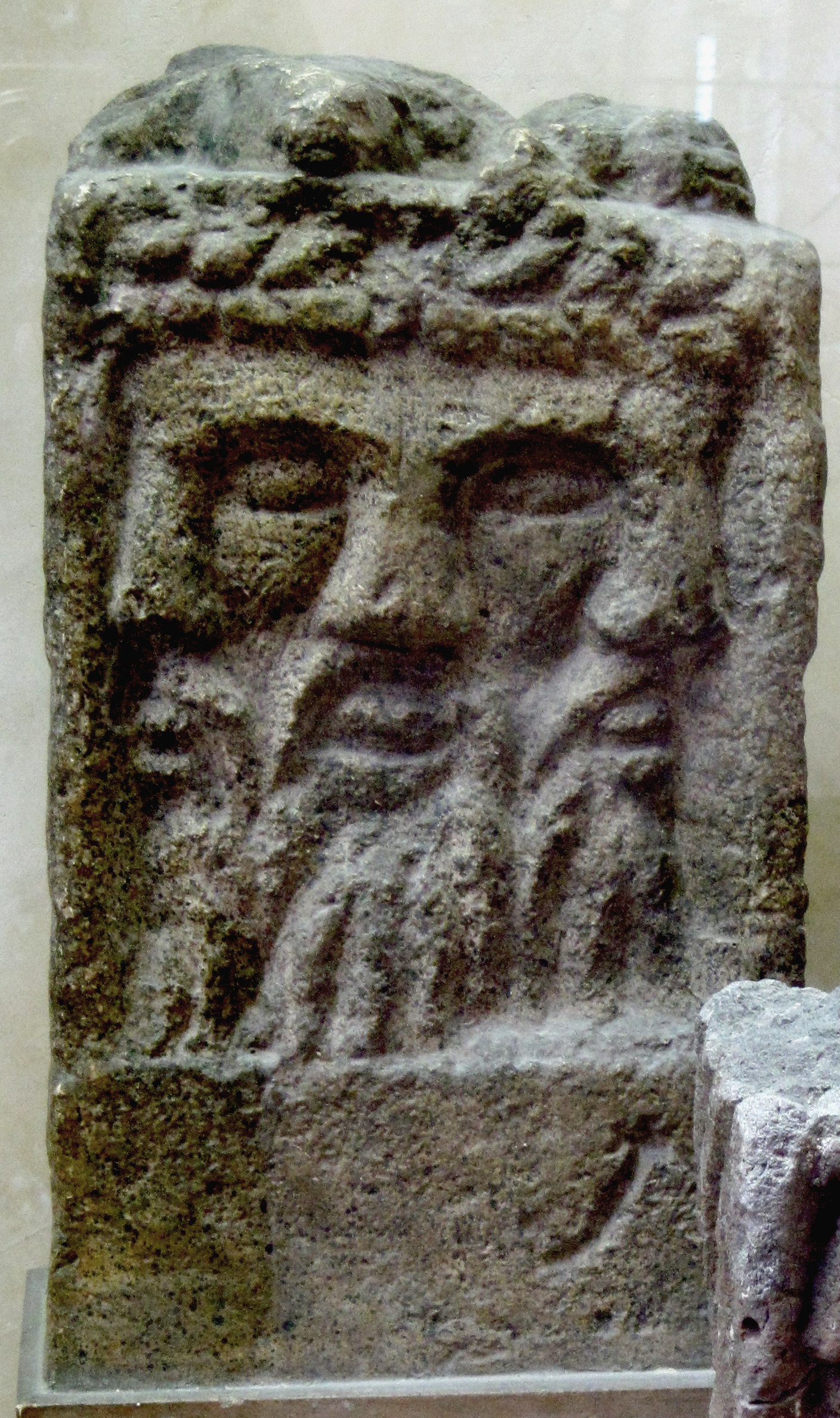 Autel tricéphale découvert en 1852 à Reims (rue Houzeau-Muiron).